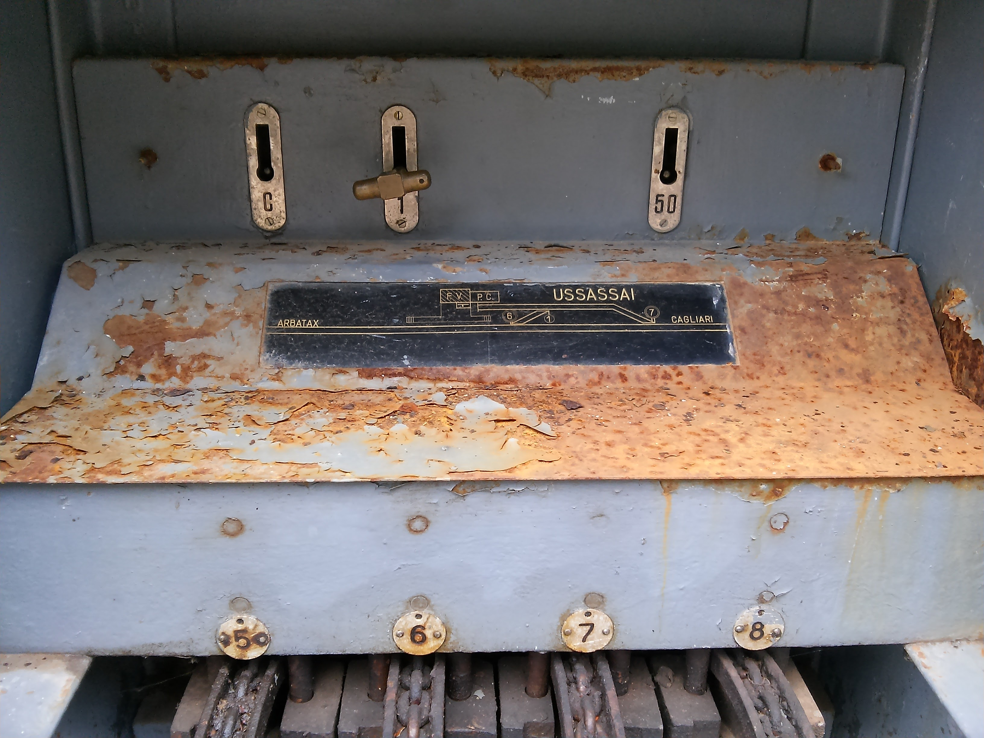 Schema degli scambi della stazione di Ussassai